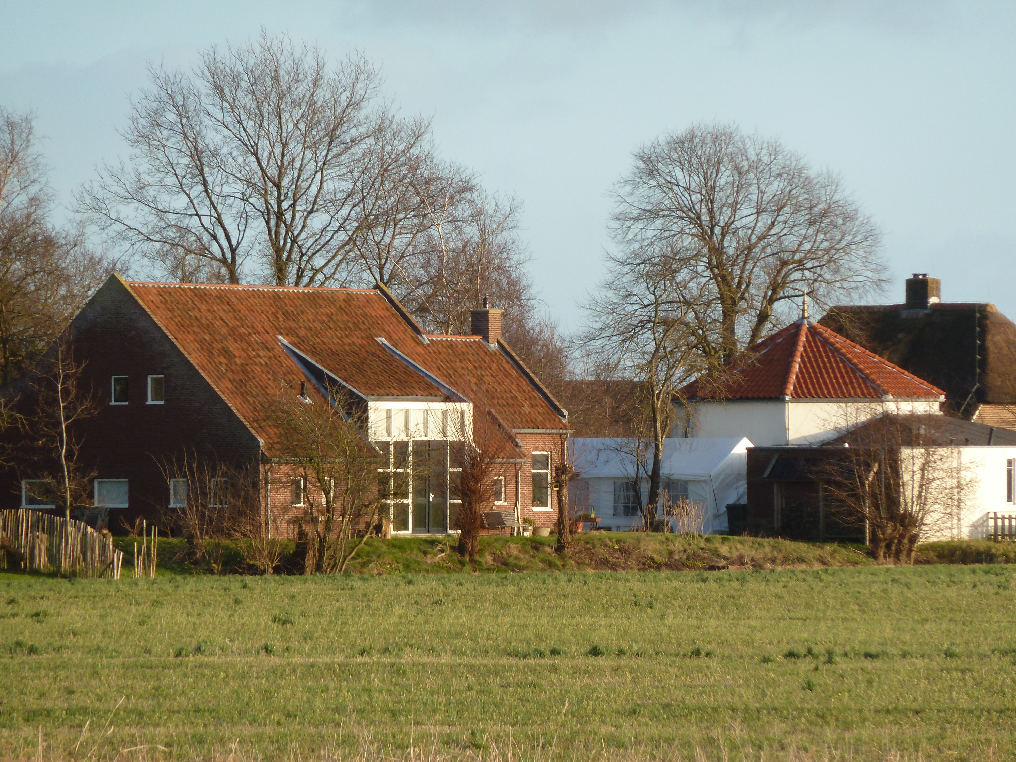 Restant van de molen van Sint-Annen, nu dorpshuis Meuln.